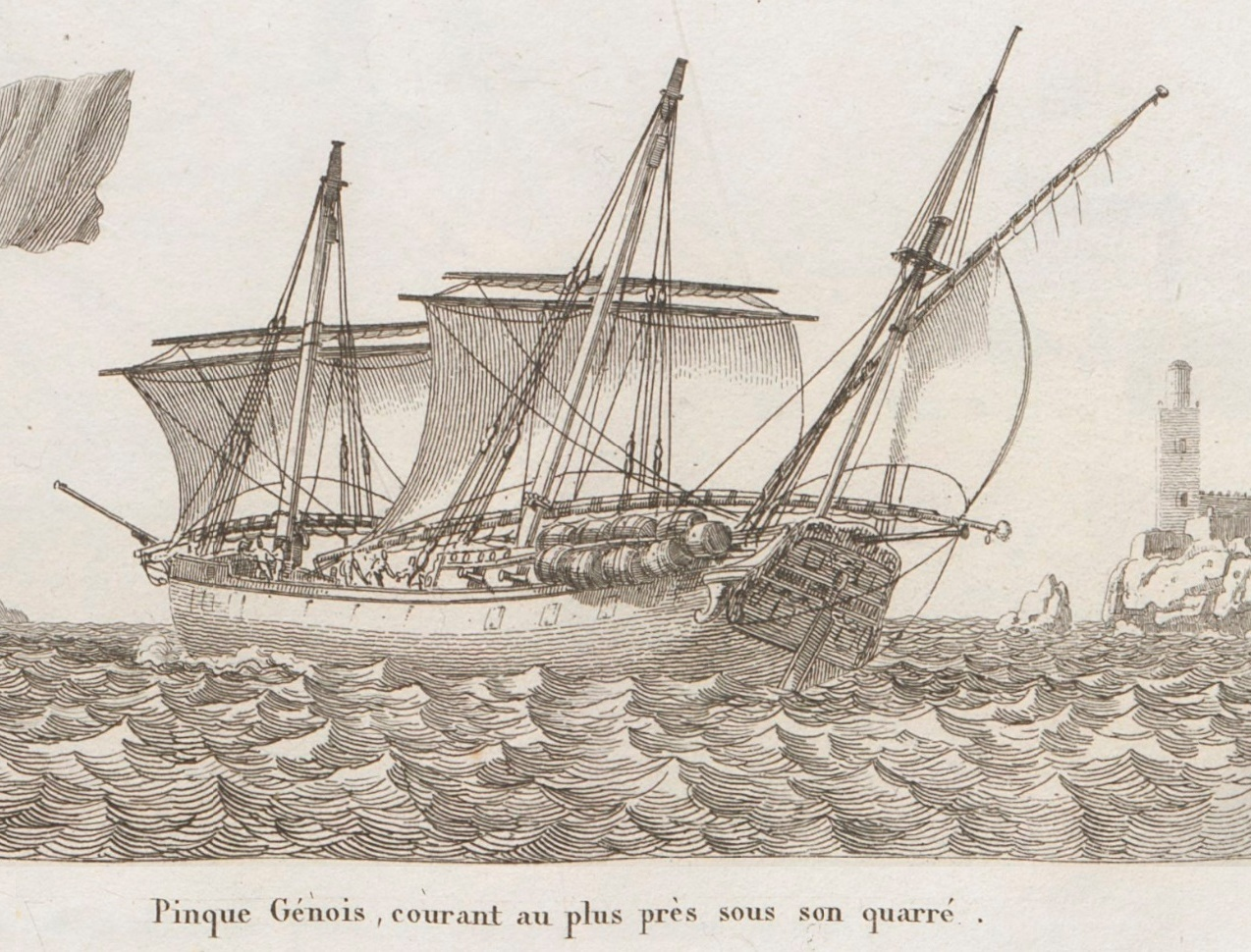 Gravure publiée en 1826 dans la Collection de toutes les espèces de bâtiments de guerre et de bâtiments marchands qui naviguent sur l'Océan et dans la Méditerranée, dessinée d'après nature et gravée par Baugean, mais réalisée avant 1819 (date de la mort de l'auteur).